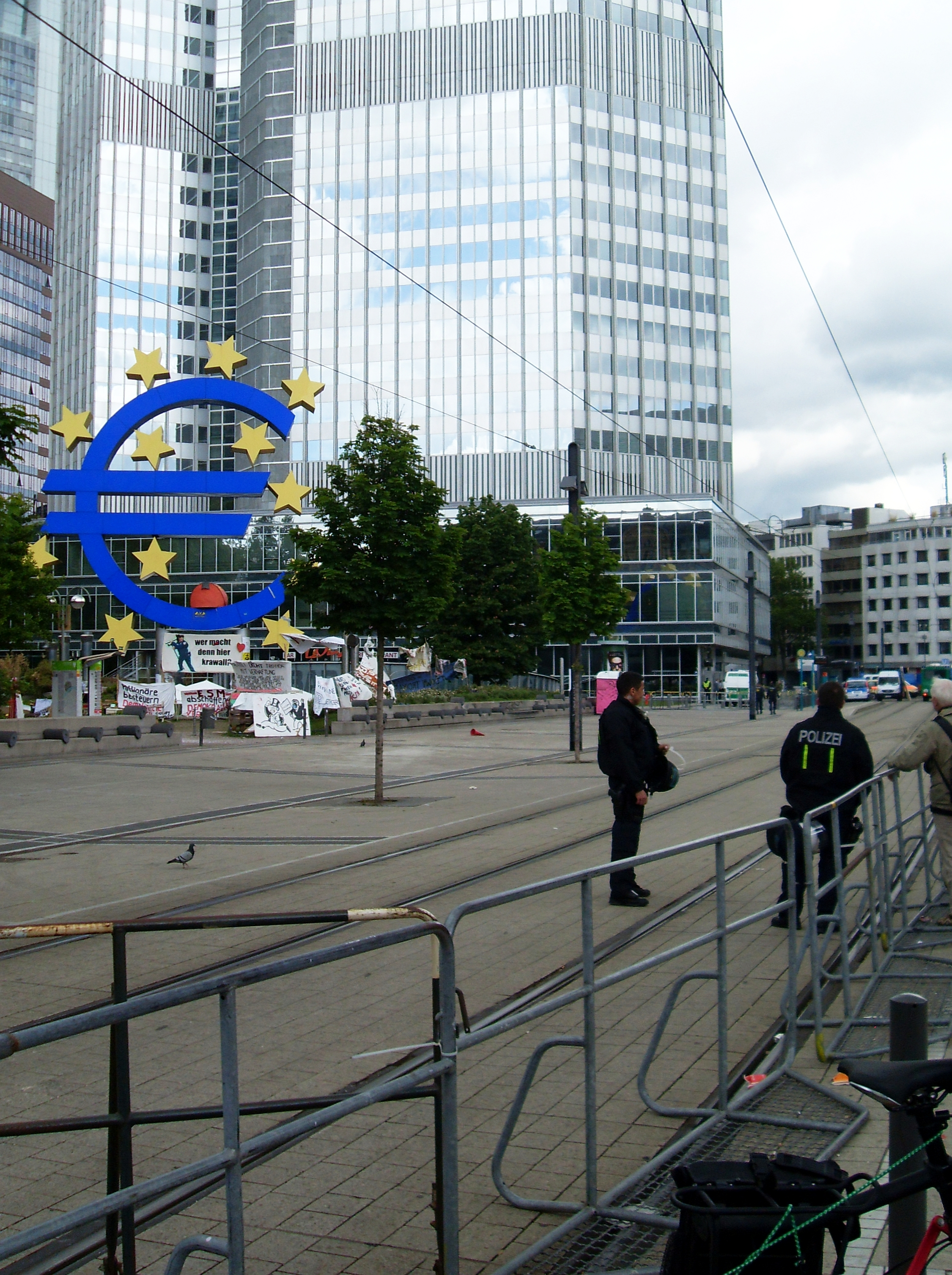 Absperrungsmaßnahmen um die EZB und das geräumte Occupy-Camp am 16. Mai 2012 nachmittags